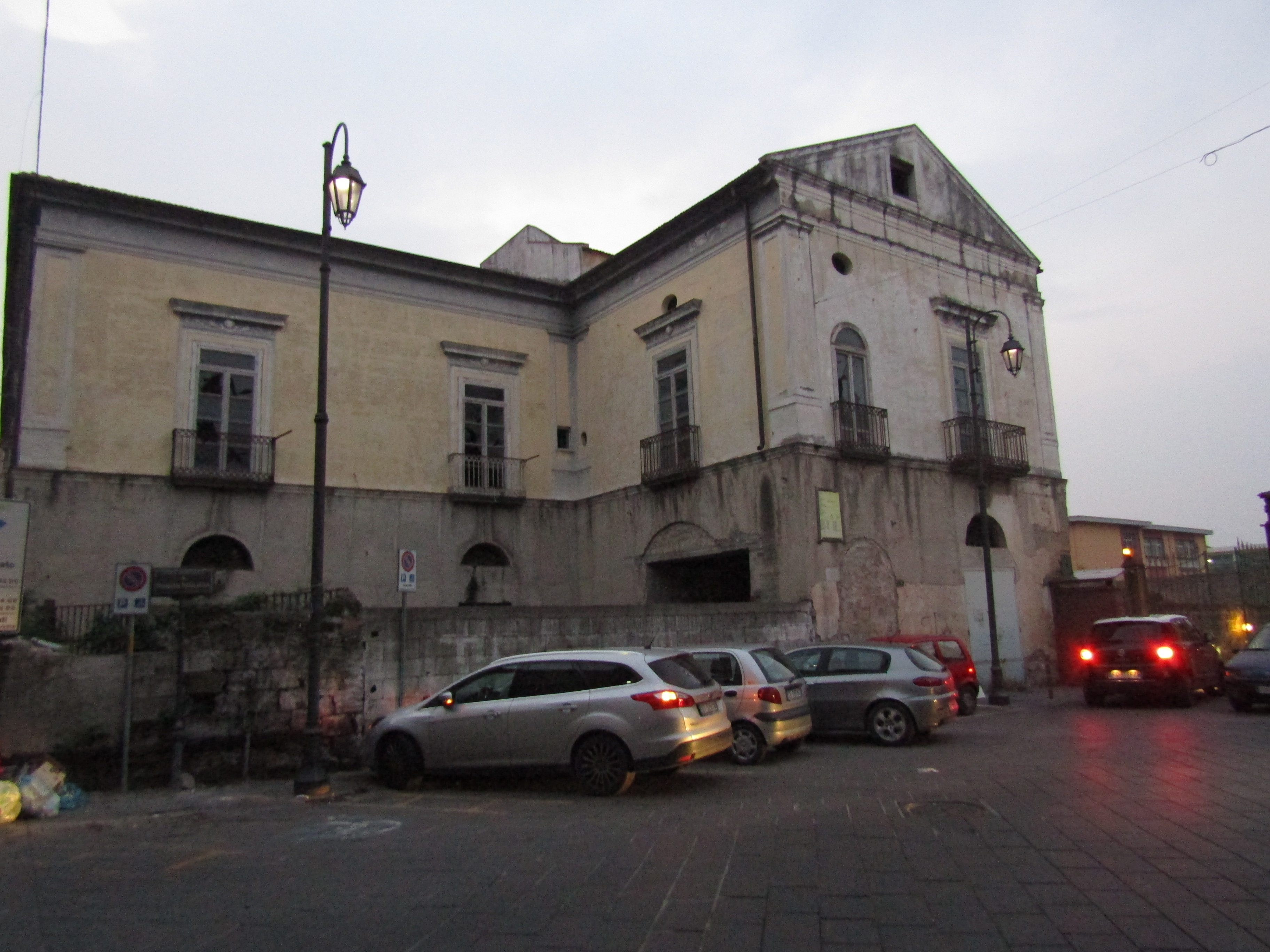 {Informazioni file |Descrizione = Scorcio di Piazzetta Pagliara, Nocera inferiore. |Fonte = Mariano Rocco |Data = 22/02/2019 |Autore = Mariano Rocco |Licenza = vedi sotto |Detentore copyright = Mariano Rocco |EDP = |Altre versioni =